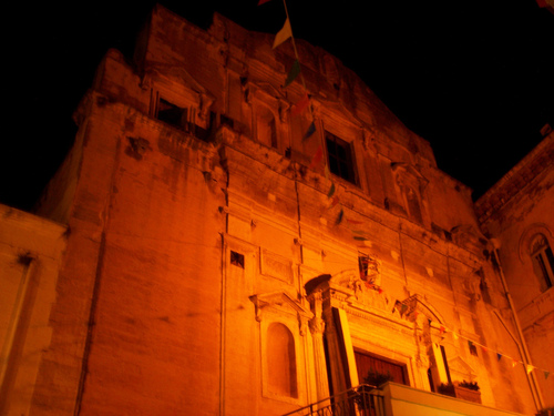 Rocco Rocco